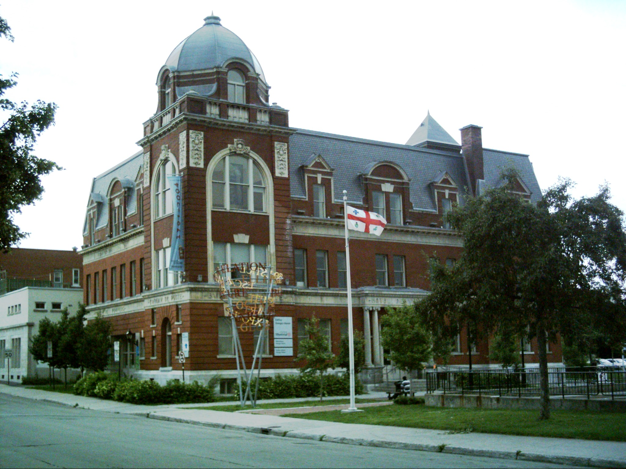 L'édifice Georges-Vanier est situé au 2450 rue Workman à Montréal